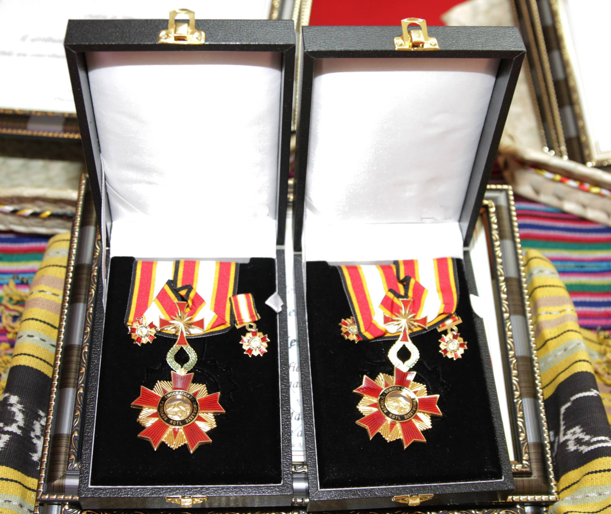 Verleihung des Ordem de Timor-Leste, 30. August 2014.